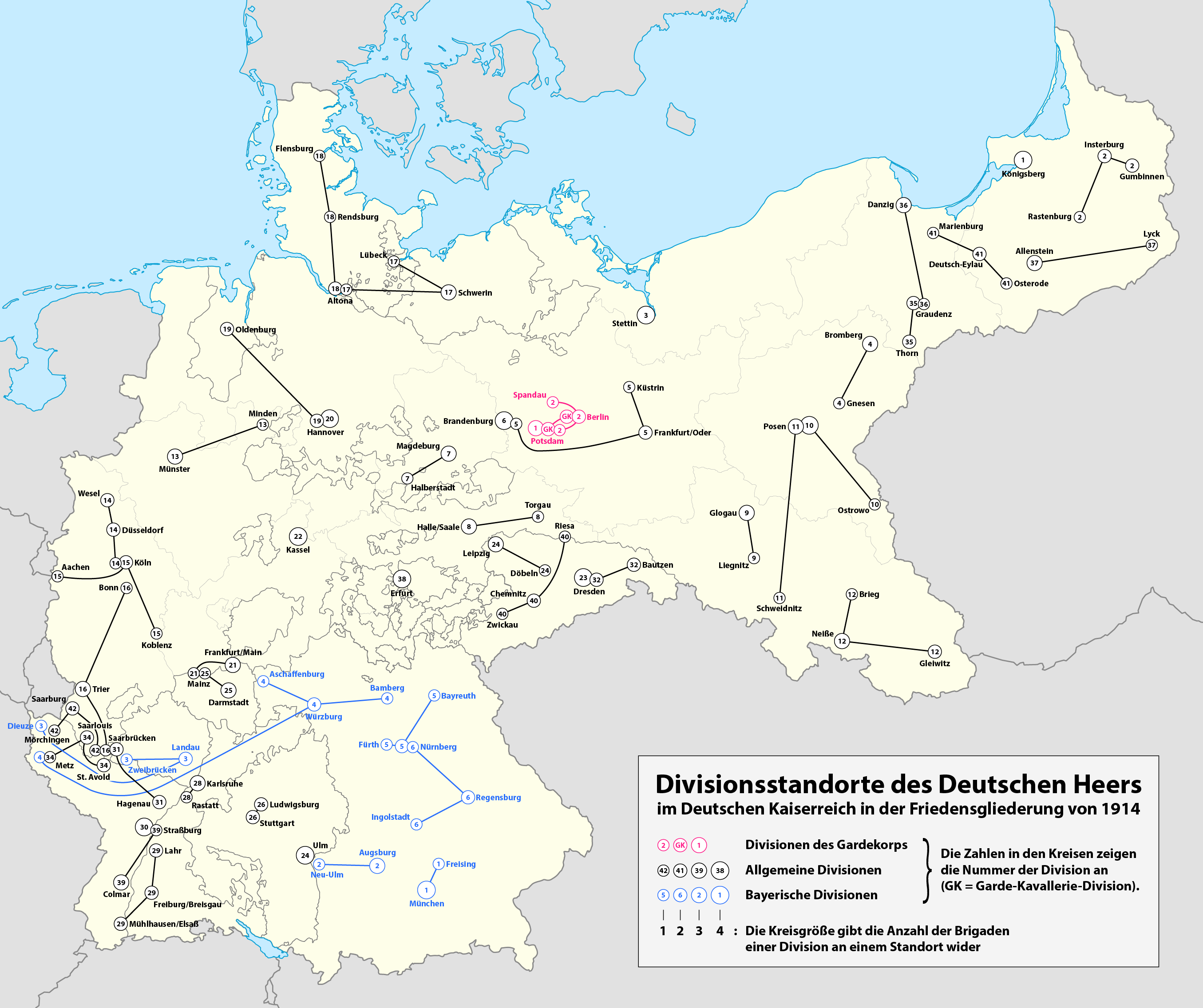 Karte der Divisionsstandorte des Deutschen Heers im Deutschen Kaiserreich in der Friedensgliederung von 1914